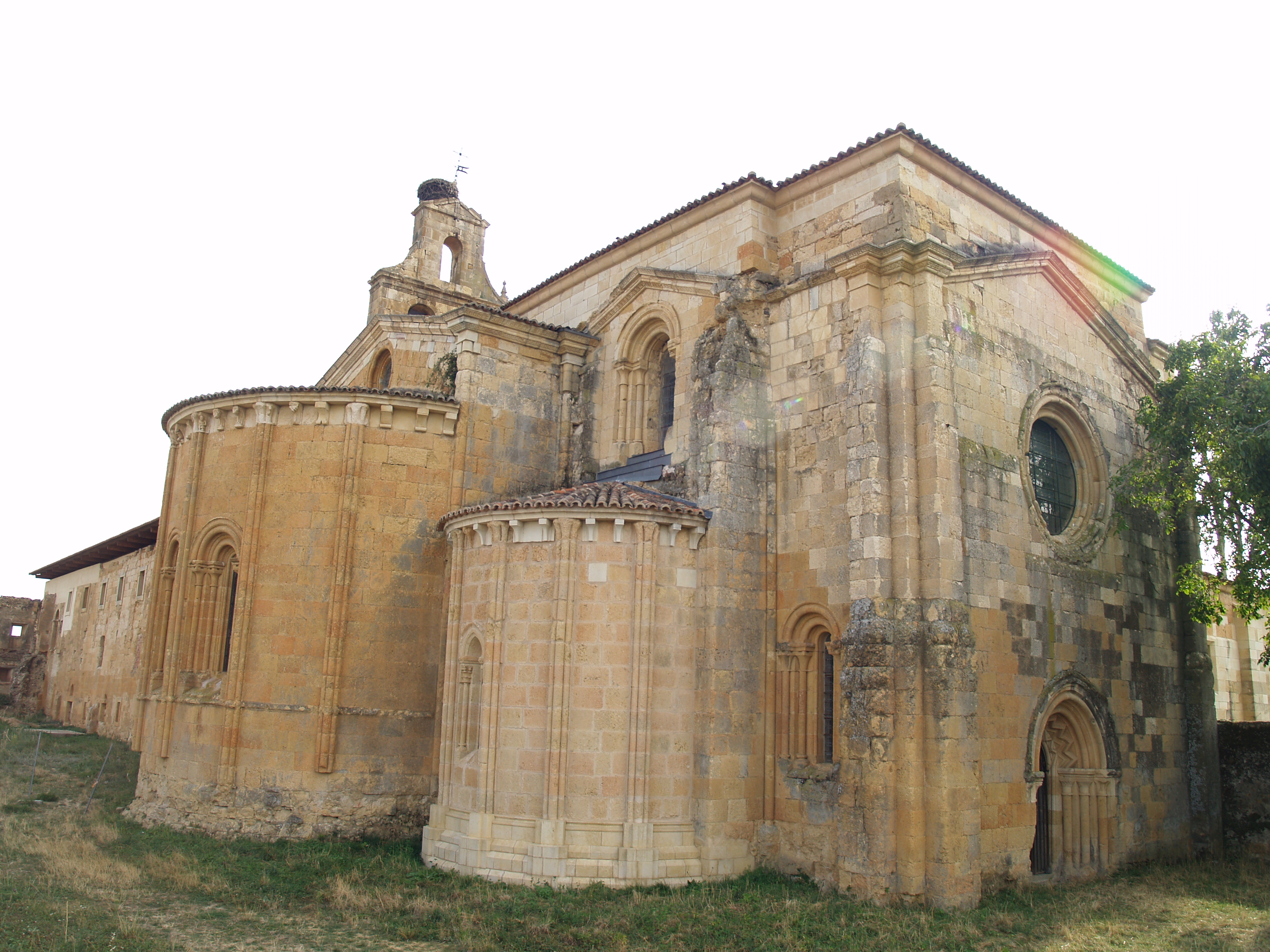 Monasterio de Villaverde de Sandoval